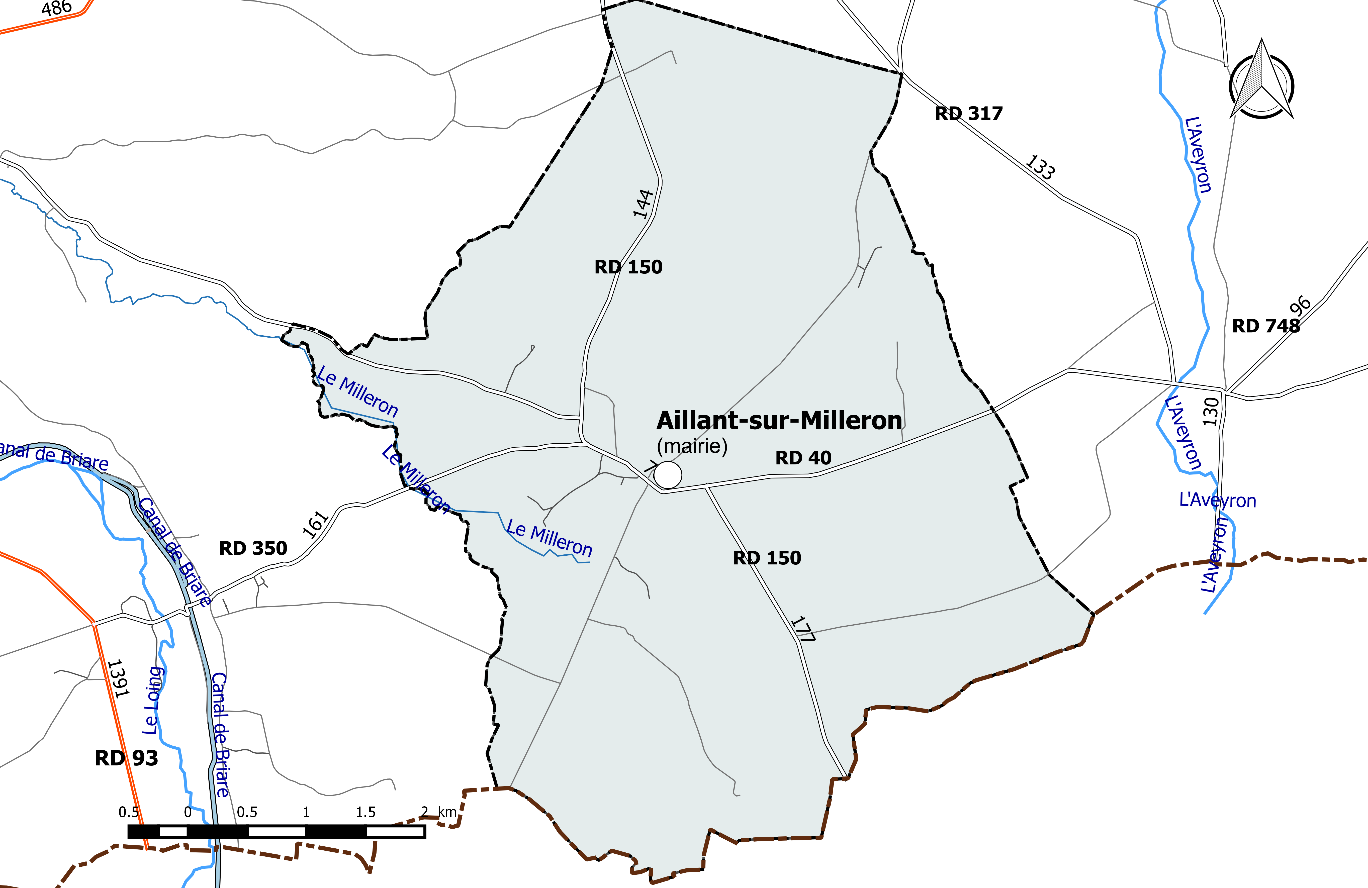 Carte du réseau routier de la commune de Aillant-sur-Milleron.